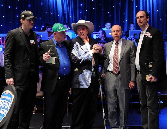 Phil Hellmuth, Dan Harrington, Doyle Brunson, Jack Binion, Eric Seidel alla cerimonia 2010 del Poker Hall of Fame